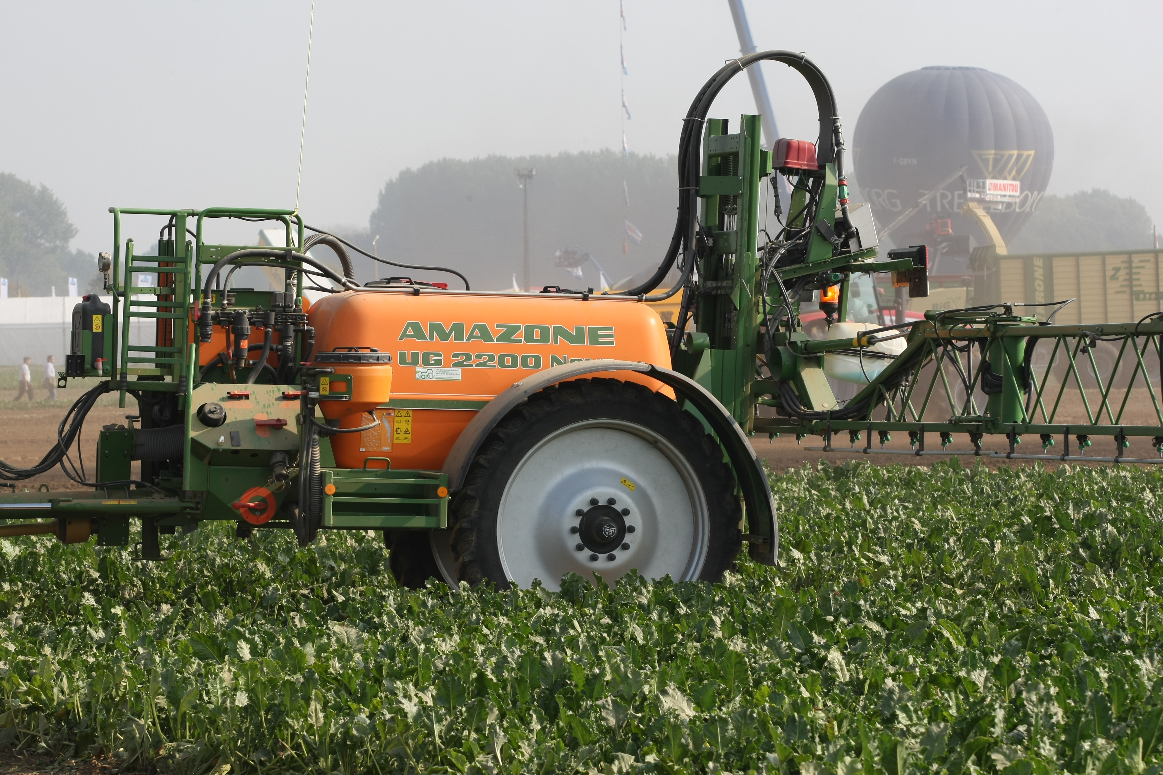 Anhängefeldspritze UG 2200 von Amazone mit Deichsellenkung und Pflegebereifung in einem Zuckerrübenfeld, Werktuigendagen 2009, Berlin